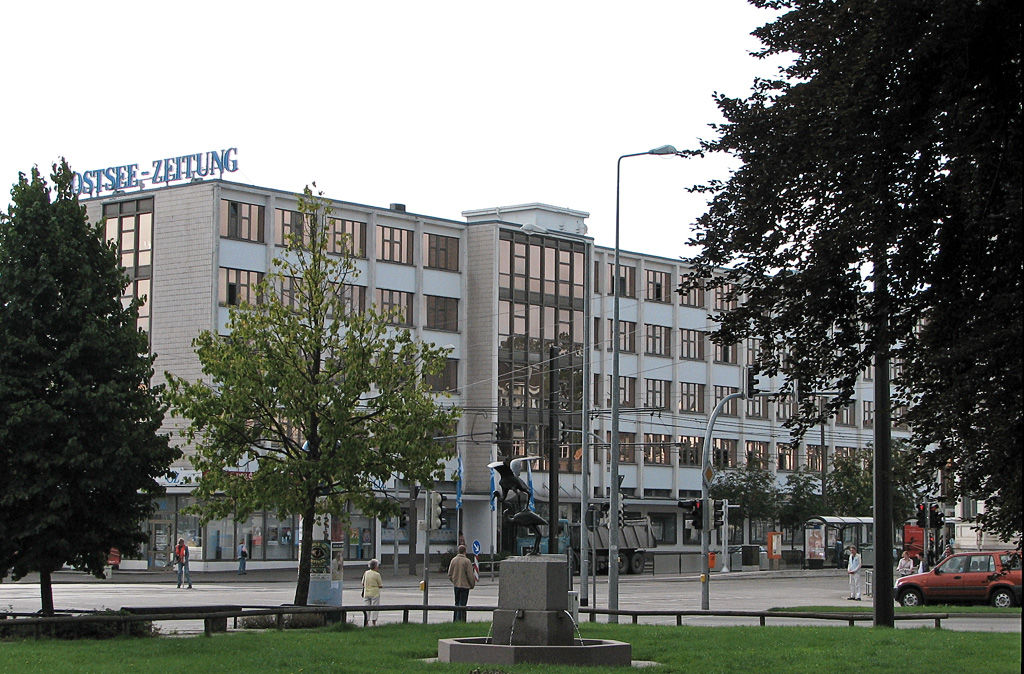 Beschreibung: Haus der Ostsee-Zeitung in Rostock / Germany Fotograf: Darkone, 17. August 2005